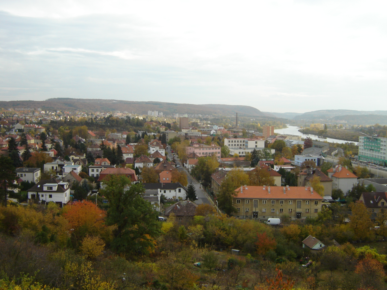 Praha-Modřany, z ulice Nad vinicí.